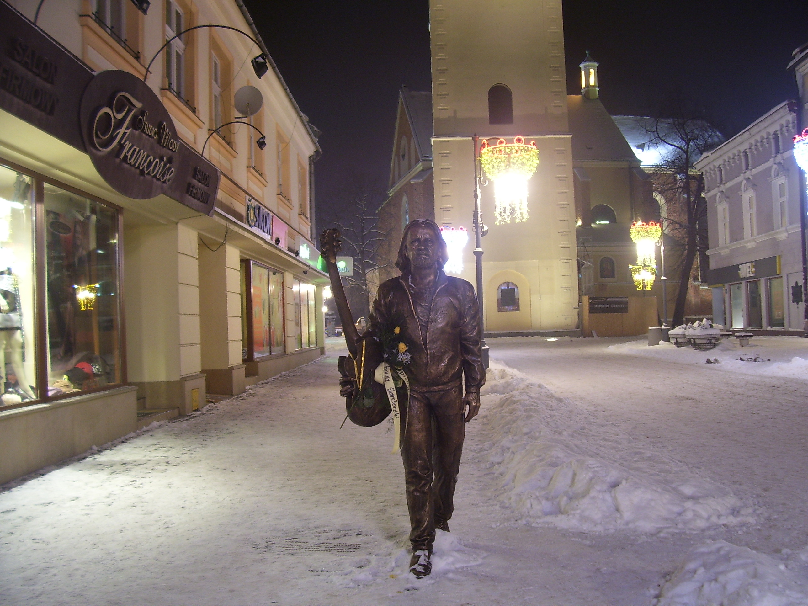 Pomnik Tadeusza Nalepy w Rzeszowie